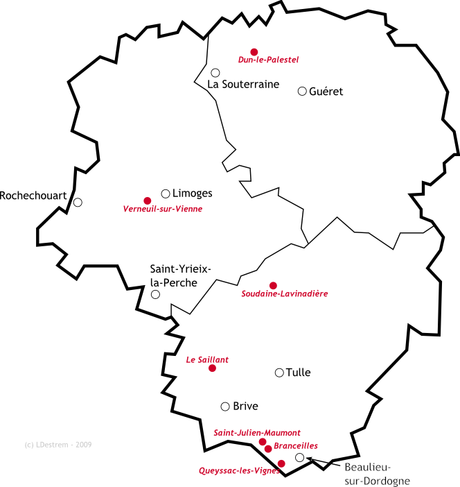 Quelques villages conservant une production viticole, en Limousin, en 2009